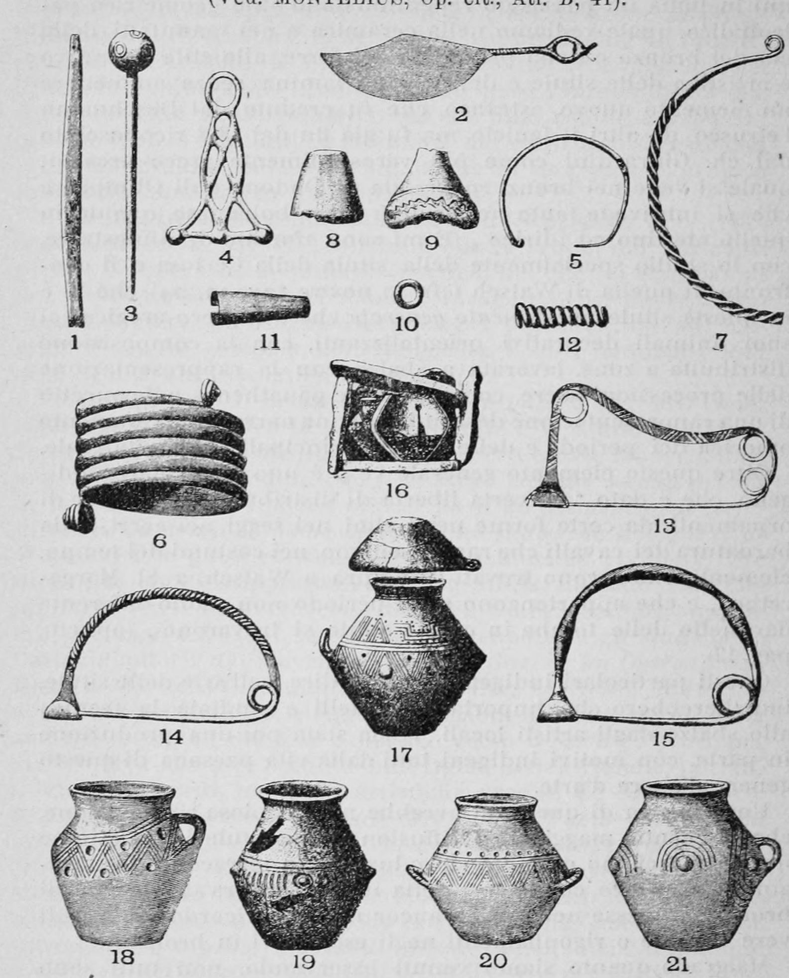 Illustrazione da Trattato di archeologia (Gentile).djvu.